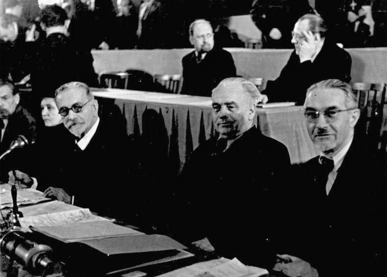 Berlin, 1. Deutscher Volkskongress ADN-ZB/IML 1. Deutscher Volkskongress für Einheit und gerechten Frieden in der Deutschen Staatsoper (Admiralspalast) in Berlin, Friedrichstraße, vom 6. bis 7. Dezember 1947. UBz: einen Ausschnitt des Präsidiums; vorn v.l.: Dr. Wilhelm Külz (LDPD), Wilhelm Pieck (SED), Otto Nuschke (CDU); hinten v.l.: Walter Ulbricht (SED), Otto Grotewohl (SED). Abgebildete Personen: Grotewohl, Otto: Ministerpräsident, stellvertretender Staatsratsvorsitzender, DDR Külz, Wilhelm Dr.: Reichsinnenminister, DDP, Oberbürgermeister von Dresden, Gründer Liberal-Demokratische Partei Deutschlands (LDPD), Deutschland (GND 118725114) Nuschke, Otto: Stellvertretender Ministerratsvorsitzender, Vorsitzender des Volkskongresses, CDU, DDR Pieck, Wilhelm: Präsident, Politbüro der SED, Vorsitzender der KPD, DDR Ulbricht, Walter: Staatsratsvorsitzender, Erster Sekretär des Zentralkomitees (ZK) der SED, Vorsitzender des Nationalen Verteidigungsrates, DDR